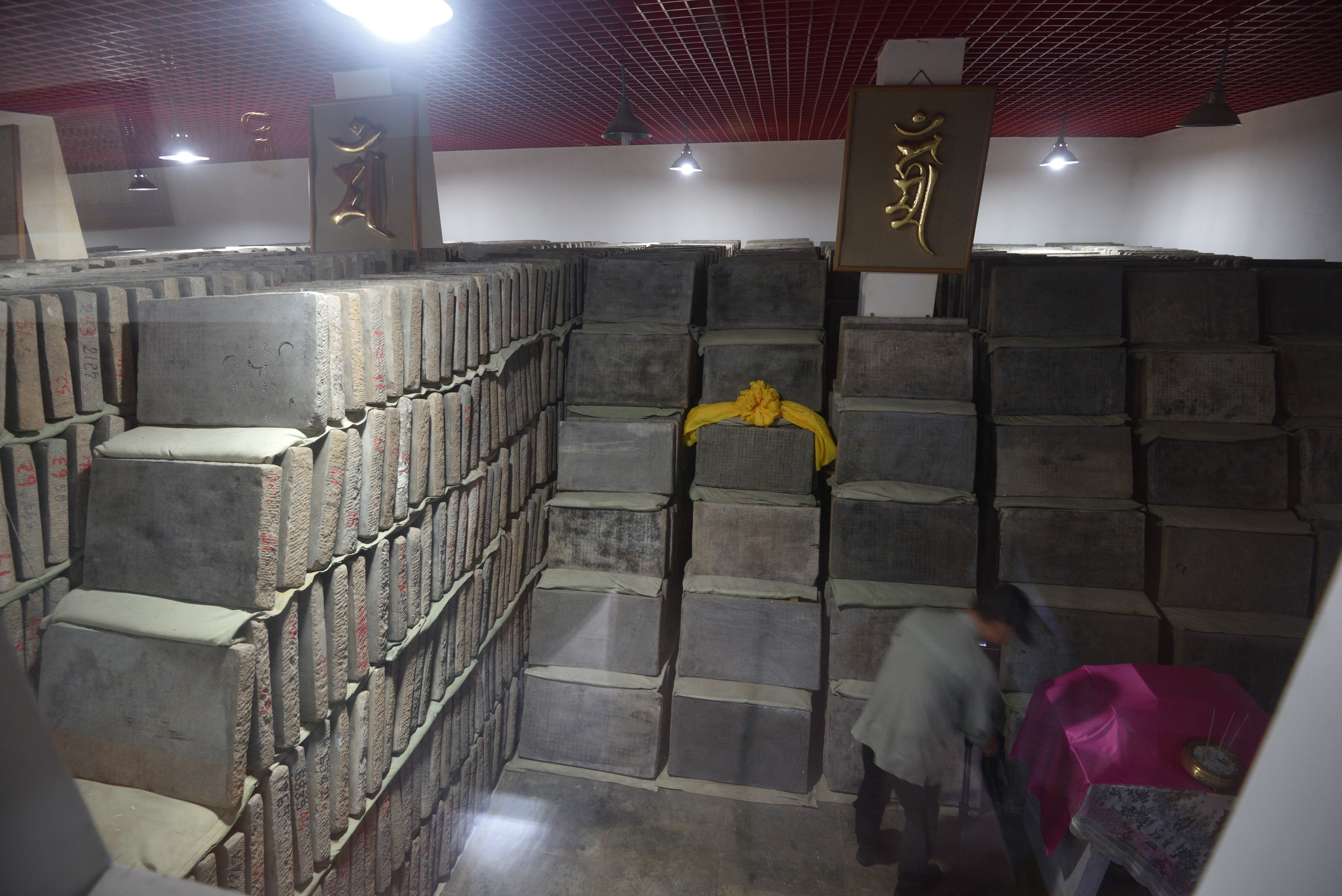 云居寺石经